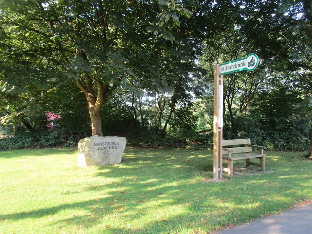 Bønstrup Fælled med Kør-med-bænk (blafferstoppested)